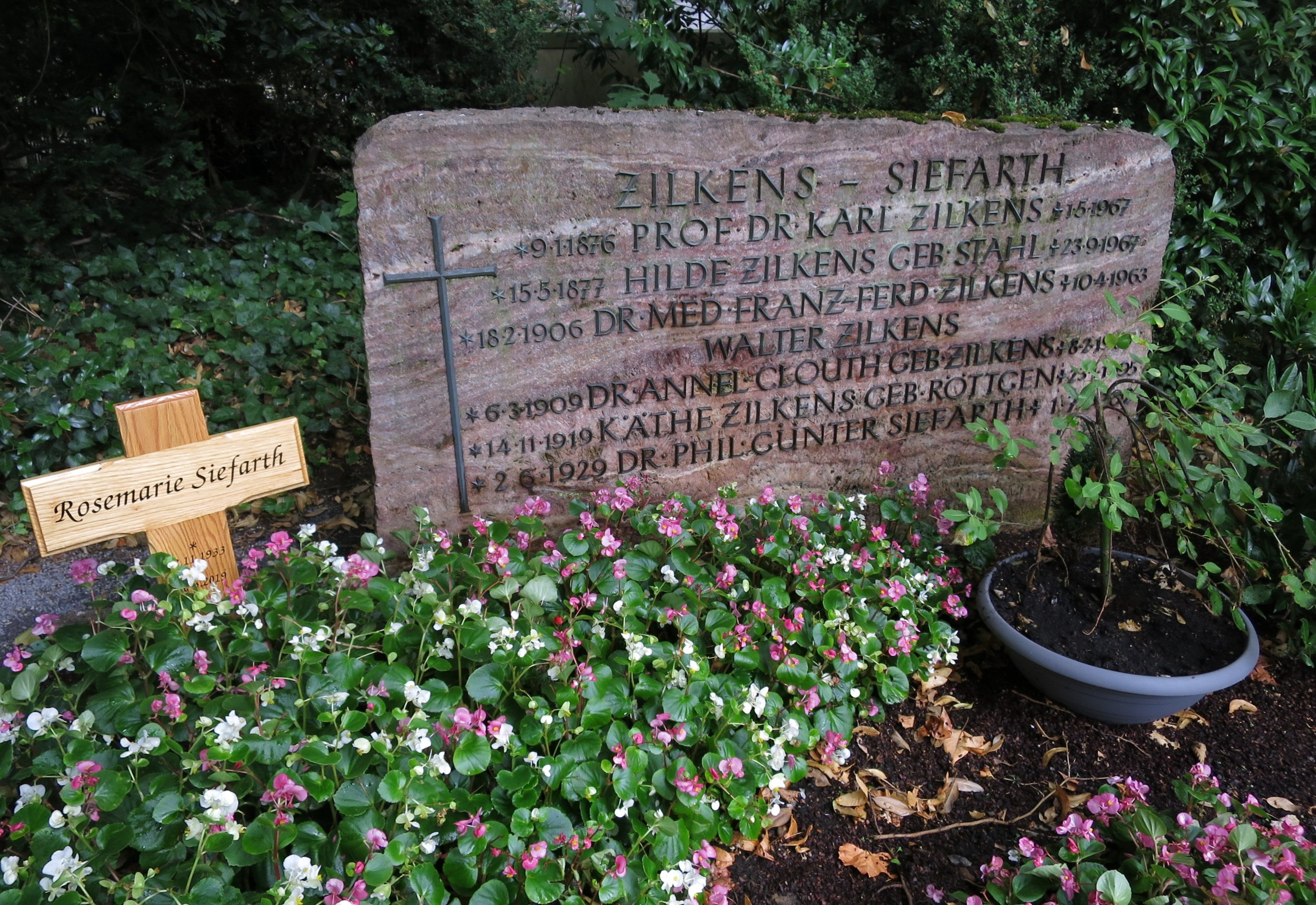 Günter Siefarth - Grab auf Melaten-Friedhof